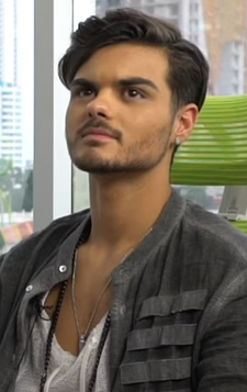 Abraham Mateo en 2017